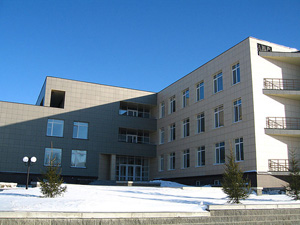 Бизнес-инкубатор в наукограде Кольцово